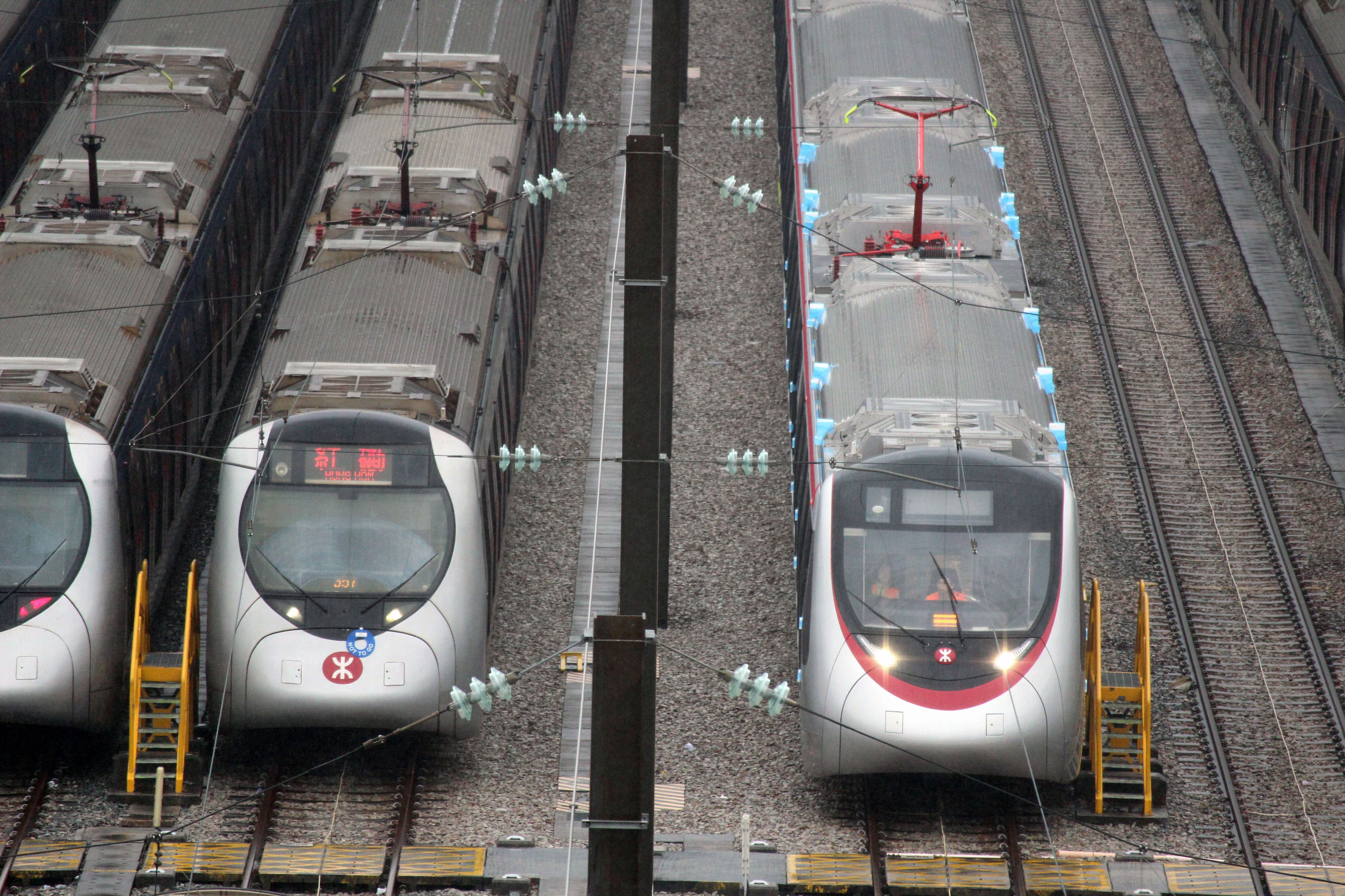 一列東西綫中國製列車正於八鄉車廠試車（圖右）